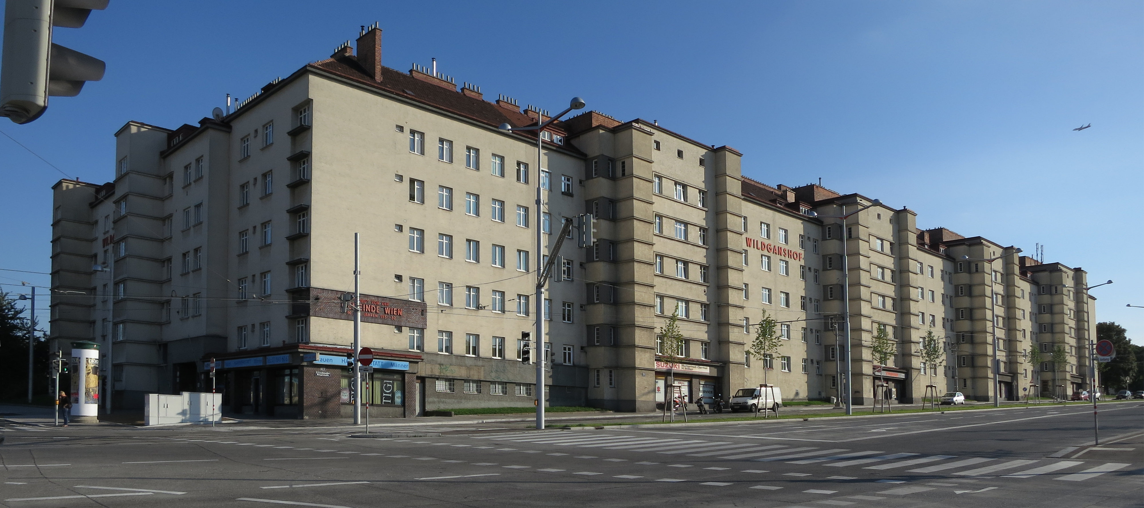 Kommunaler Wohnbau, Anton-Wildgans-Hof